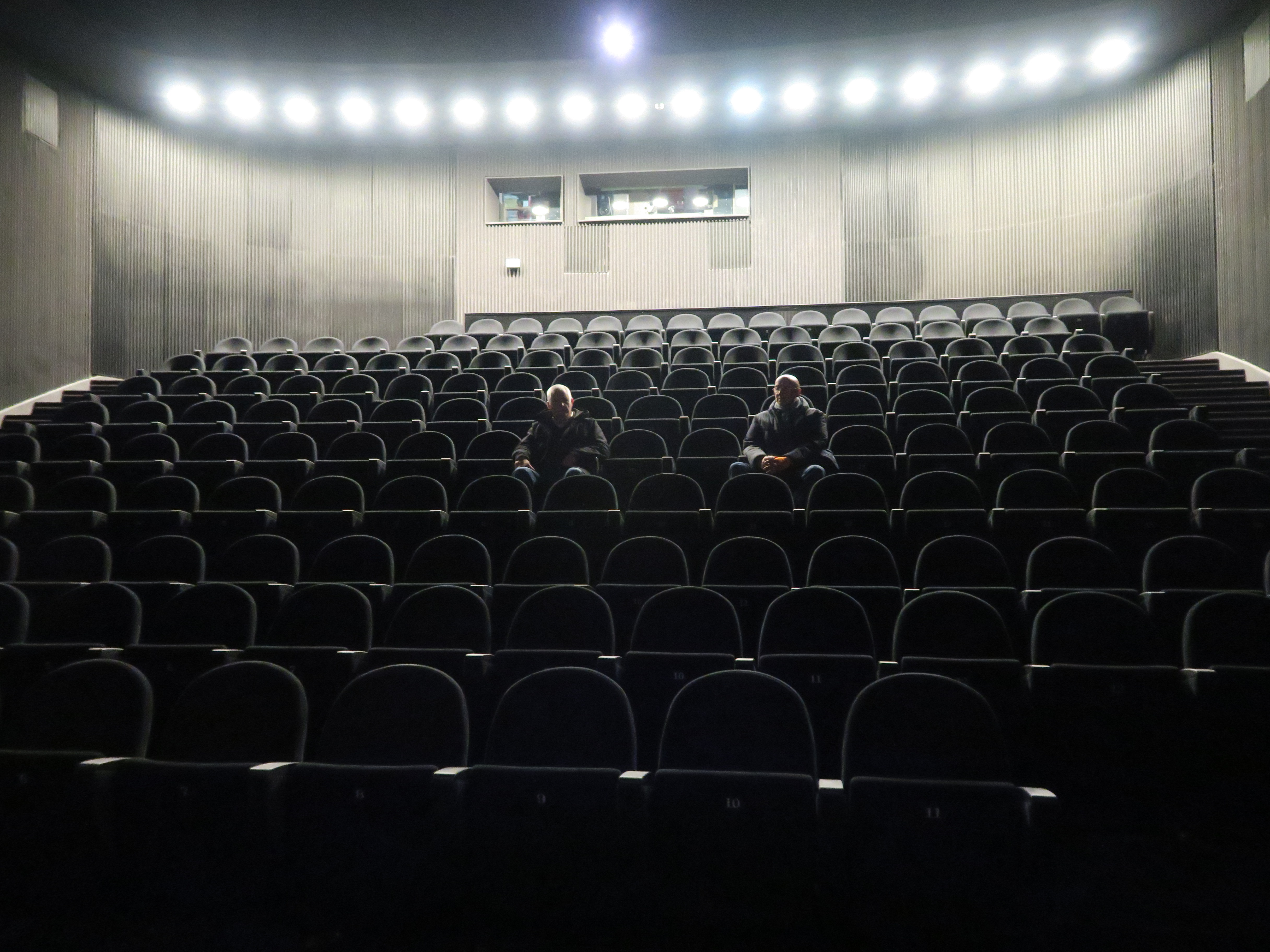 Unsichtbares Kino innen, ein schwarz-weißer Vorführraum, mit zwei Personen im Zuschauerraum, die die Räumlichkeit des Kinos definieren, mit Sicht nach hinten zur weißen Beleuchtung